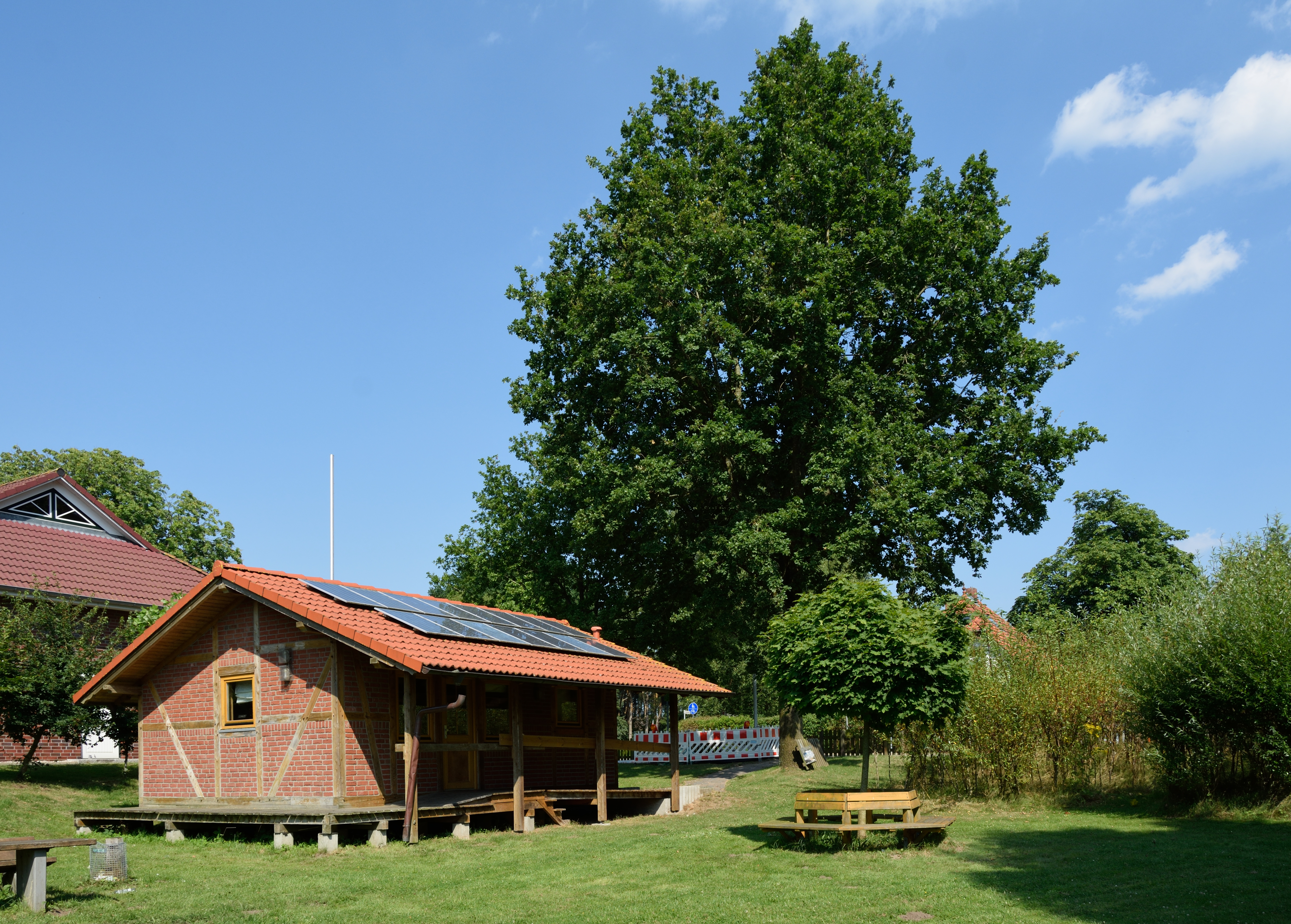 Fotos aus Brokstedt Dieses Bild zeigt das Umwelthaus Brokstedt